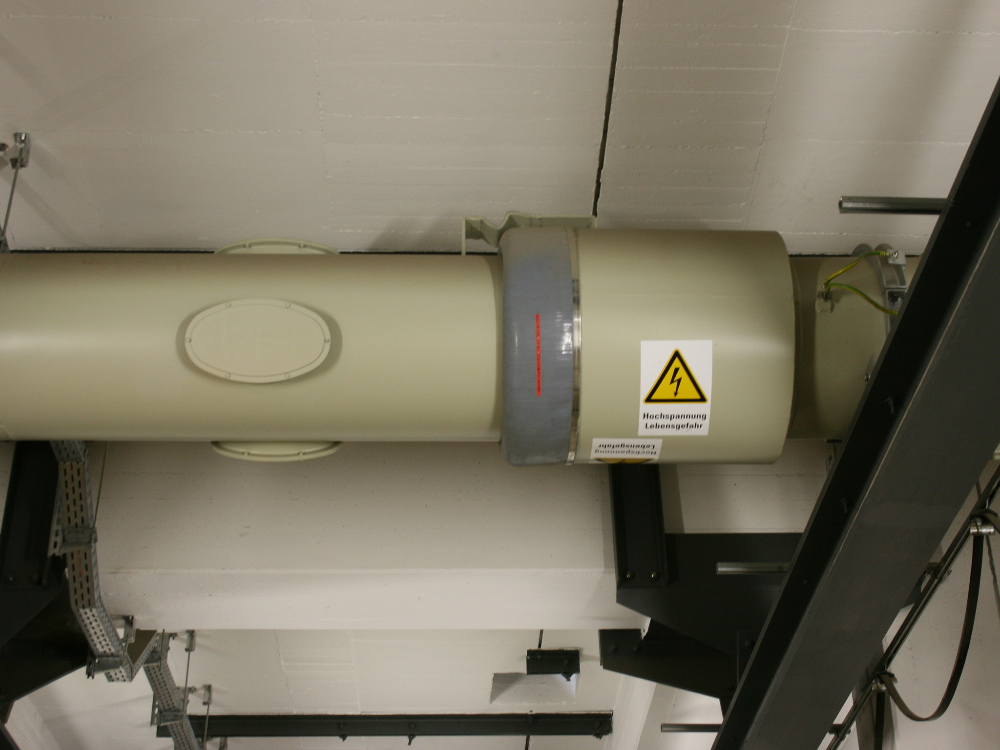 Heizkraftwerk in Wuppertal-Barmen